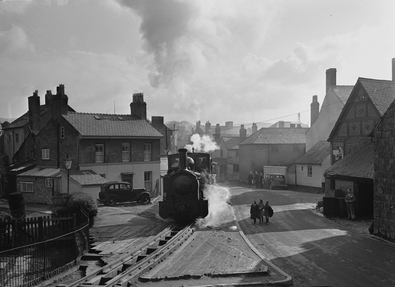 Teitl Cymraeg/Welsh title: Rheilffordd Trallwng i Lanfair Caereinion Cyfrwng/Medium: Negydd ffilm / Film negative Cyfeiriad/Reference: (gch18720) Rhif cofnod / Record no.: 3370748 Rhagor o wybodaeth am gasgliad Geoff Charles yn Llyfrgell Genedlaethol Cymru More information about the Geoff Charles Collection at the National Library of Wales Mae ffotograffau Geoff Charles hefyd yn rhan o Broject Europeana Libraries Geoff Charles' photographs also form part of the Europeana Libraries Project